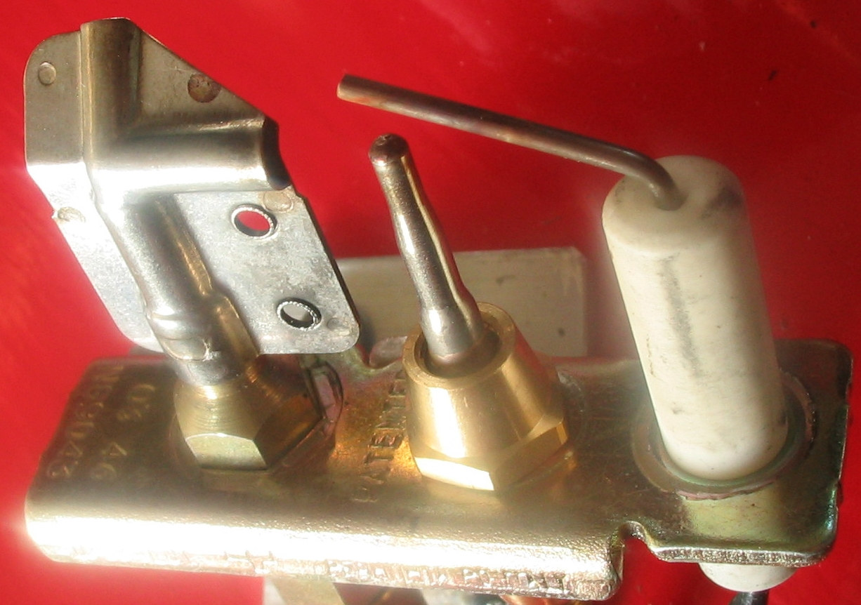 Universeel thermokoppel in een Oxypilot gemonteerd